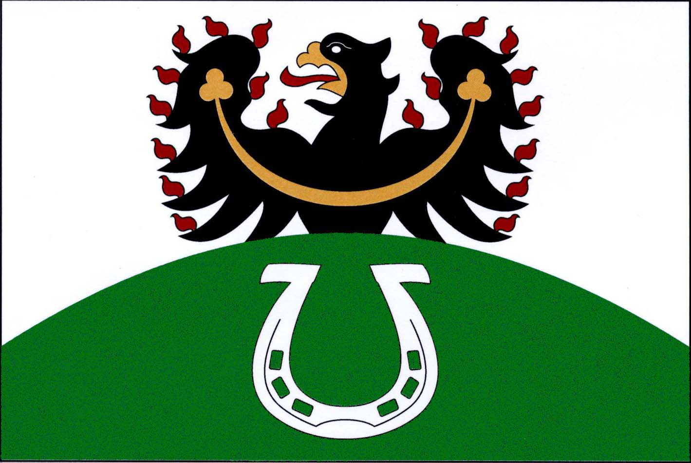 Česky: vlajka obce Chotýčany